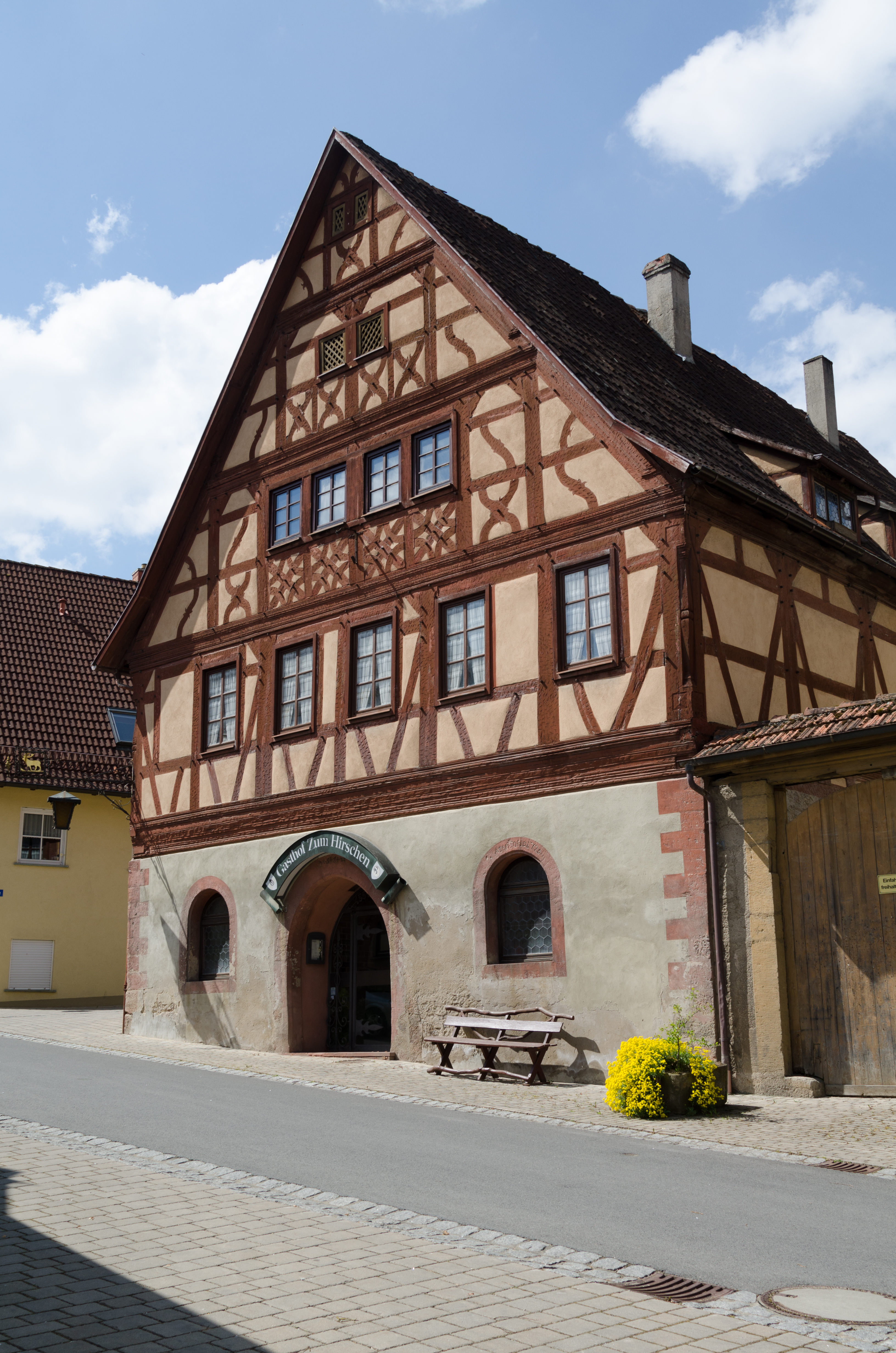 Sulzthal, Burggasse 4